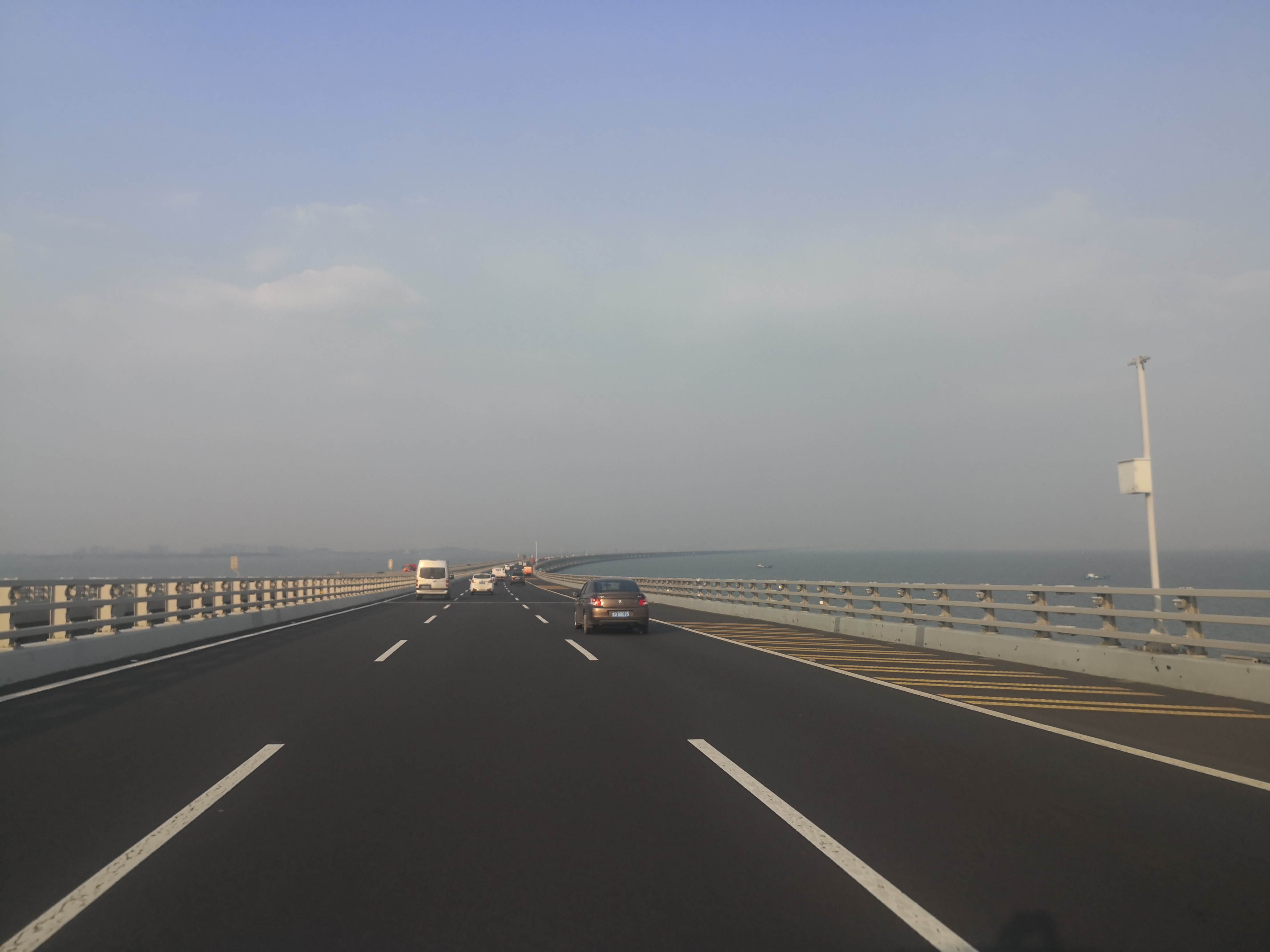 胶州湾大桥桥面